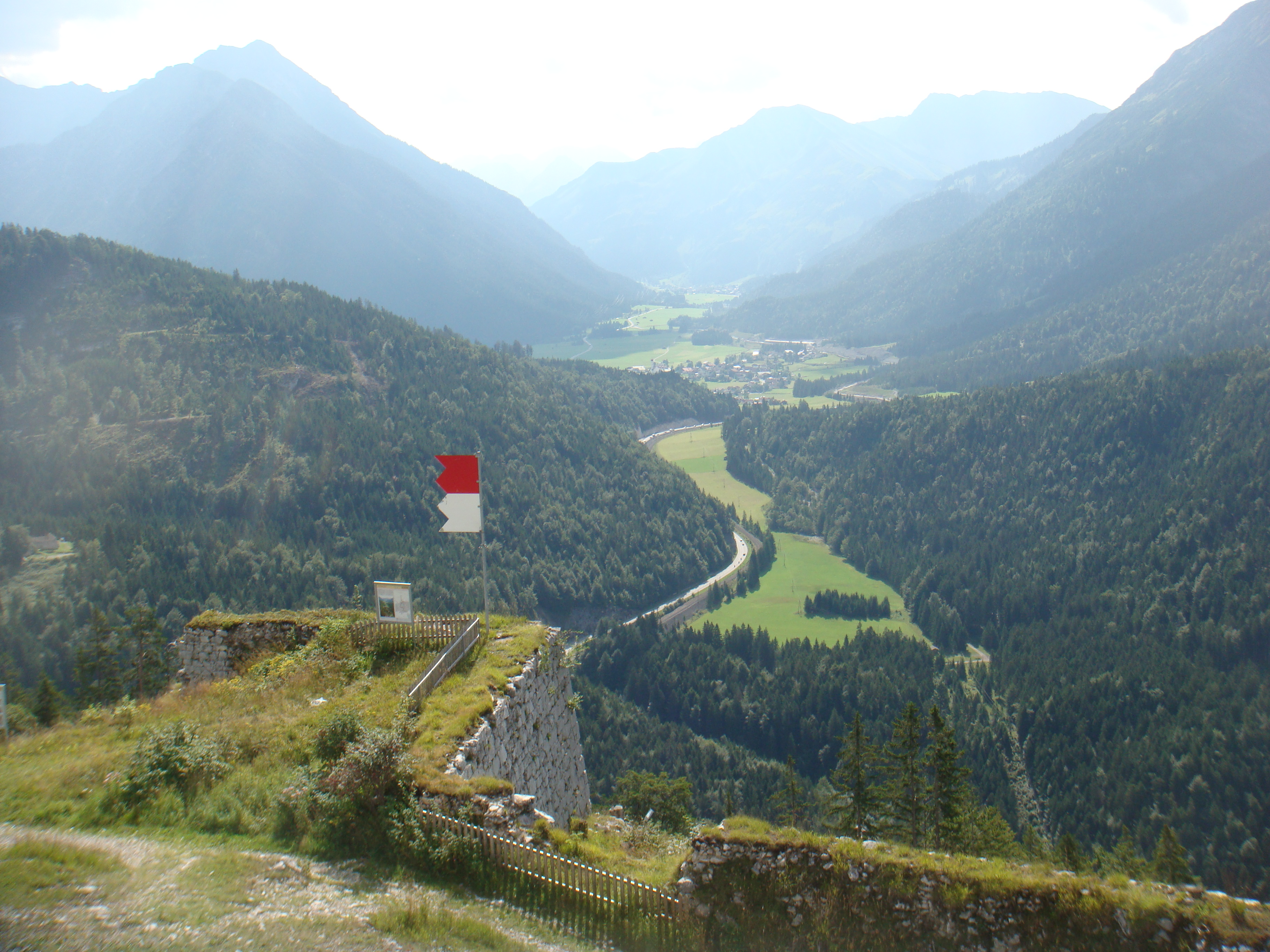 Via Claudia Augusta in Ausserfern. Von der Festung Schloßkopf